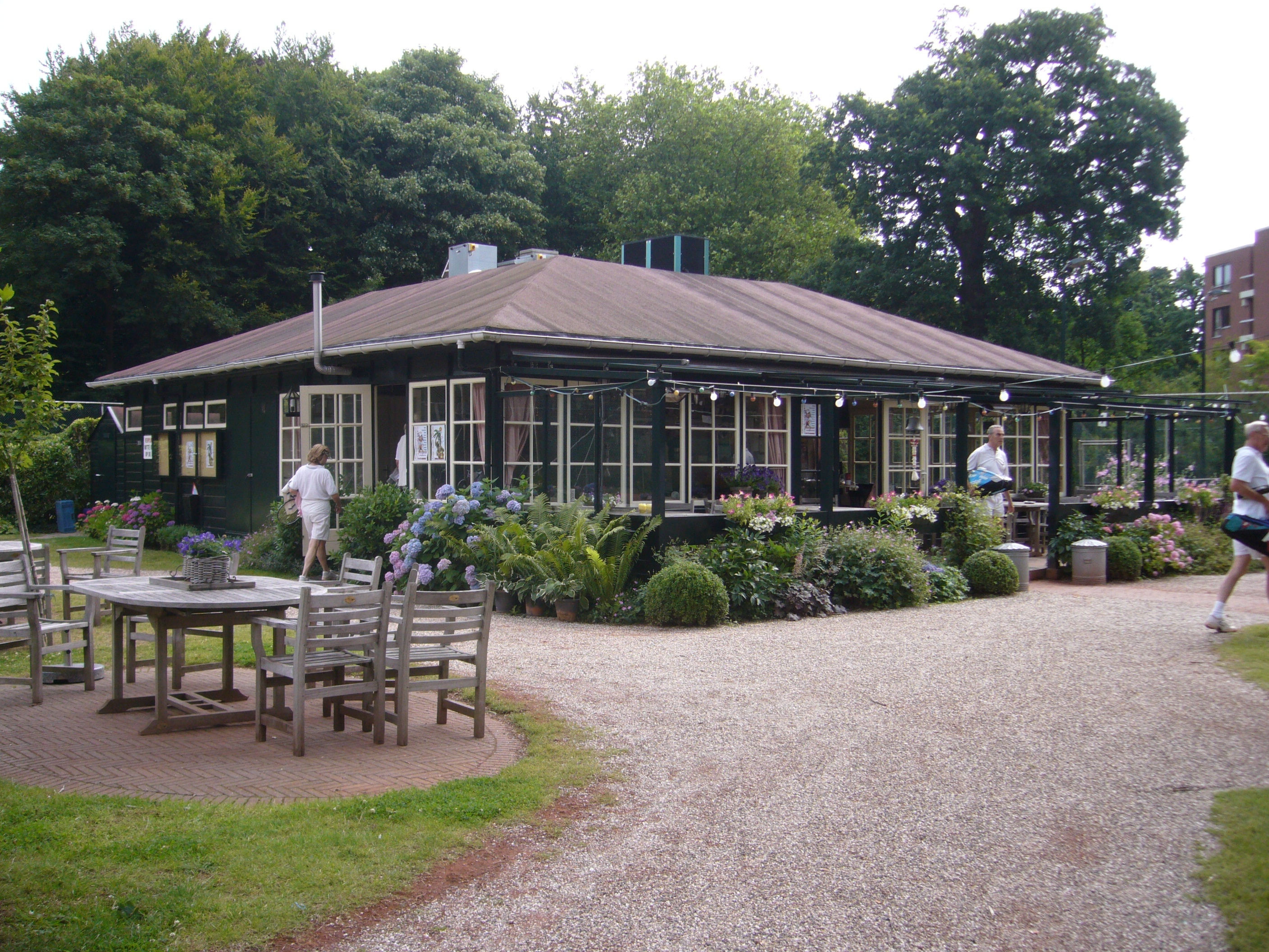 Lawn Tennis Club Kasteel Oud-Wassenaar, clubhuis